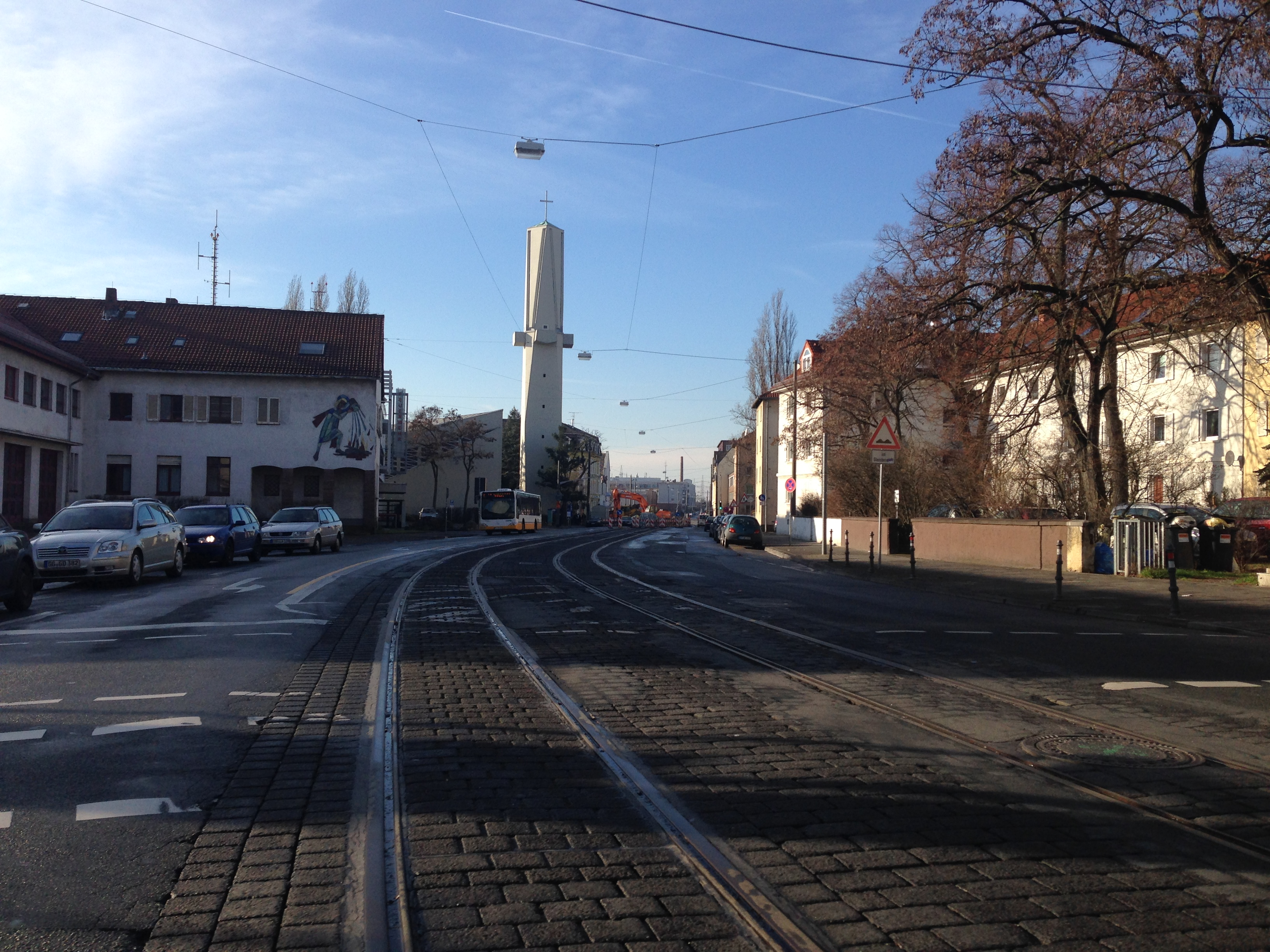 Blick von Kreuzung Dolivostraße-Bismarckstrasse Richtung Westen. Links Berufsfeuerwehr Darmstadt. Weiter hinten St. Fidelis